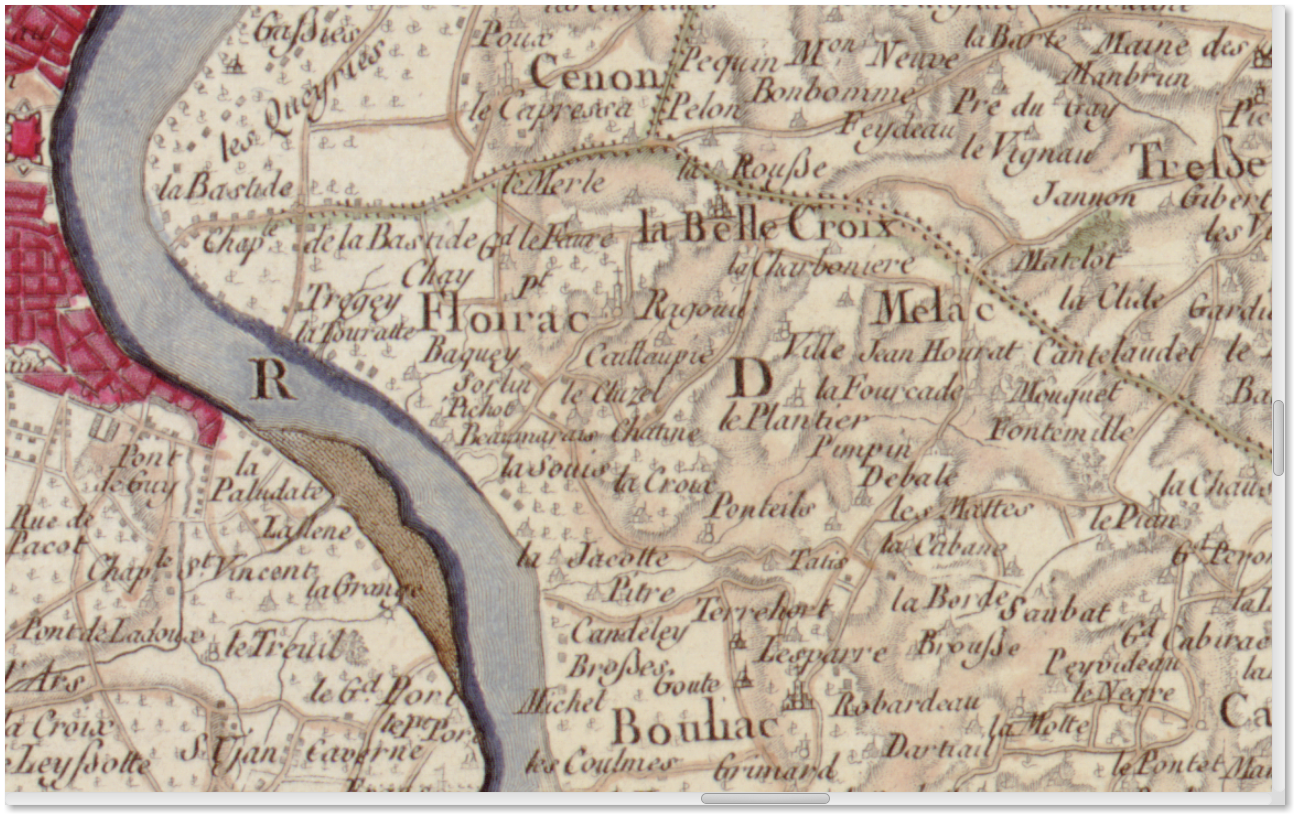 Carte de Cassini n°104 (Bordeaux, zoom sur Floirac), 1756.